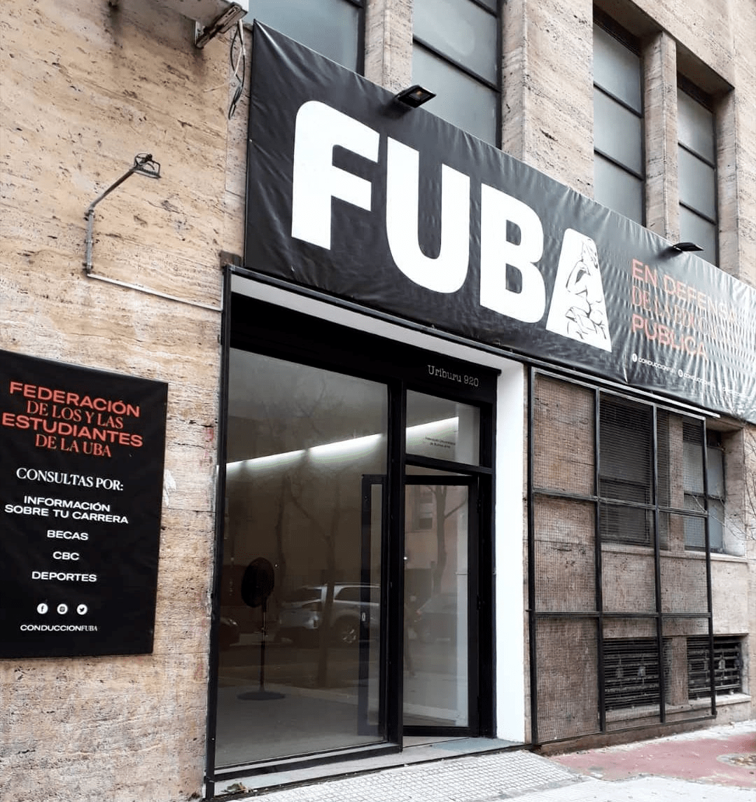 Lugar donde funciona la sede de la Federación Universitaria de Buenos Aires. Se le da atención acerca de las dudas que puedan tener todos los estudiantes de la Universidad.